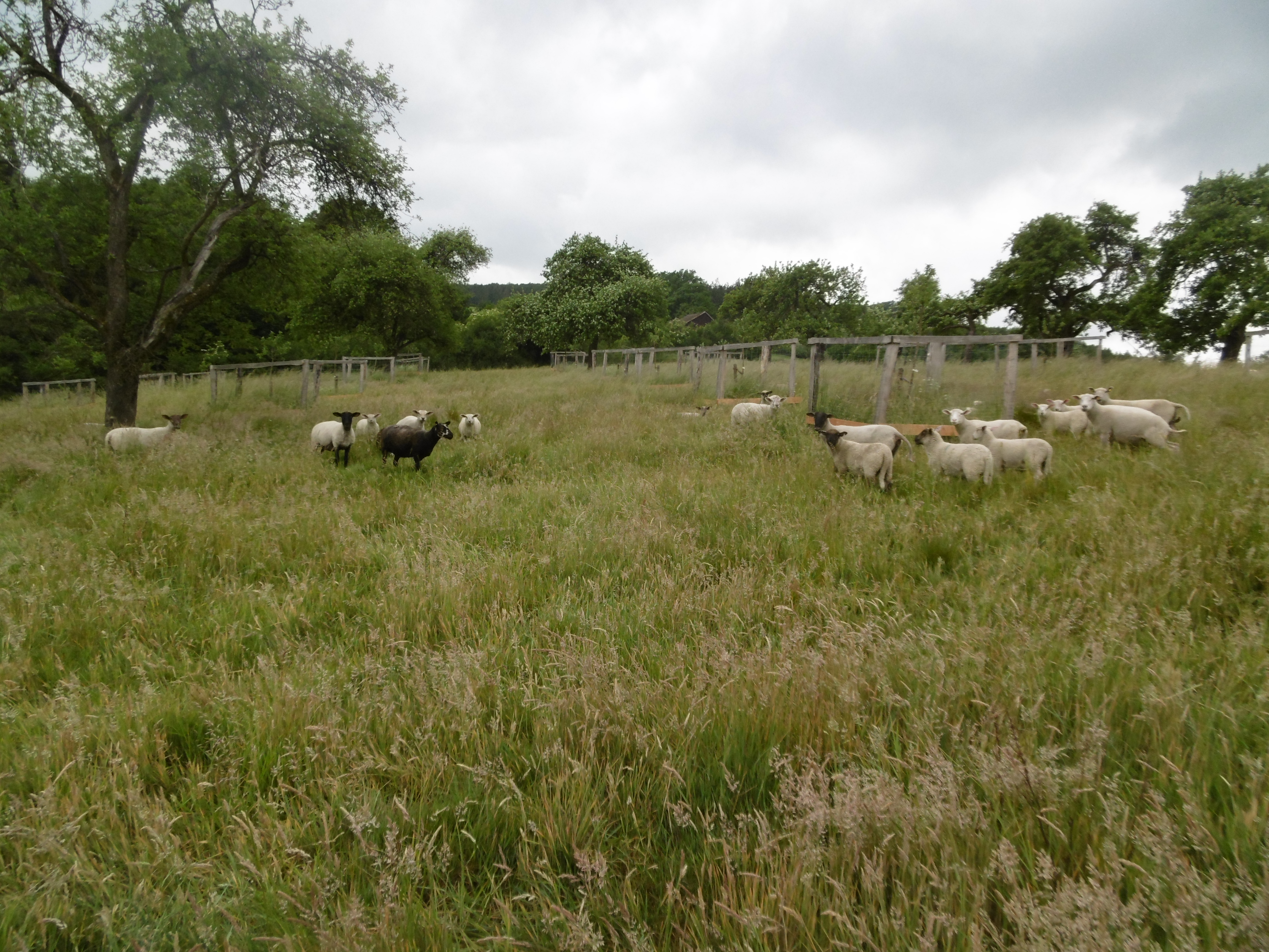 Schafe im Geschützten Landschaftsbestandteil Apfelhof Am Franziskus.